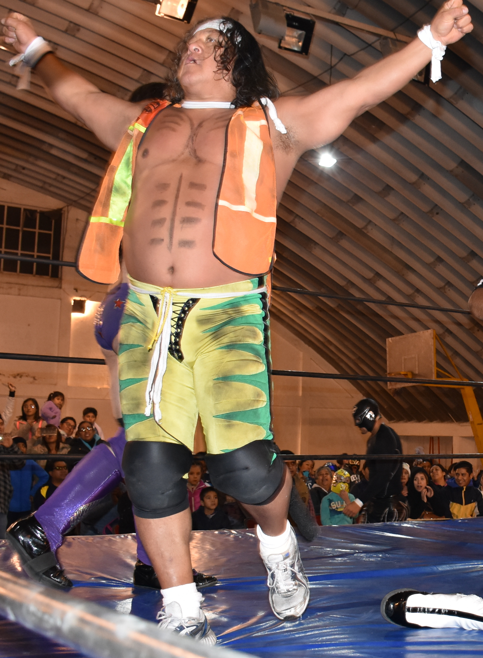 Felino et Místico II célèbrant leur victoire